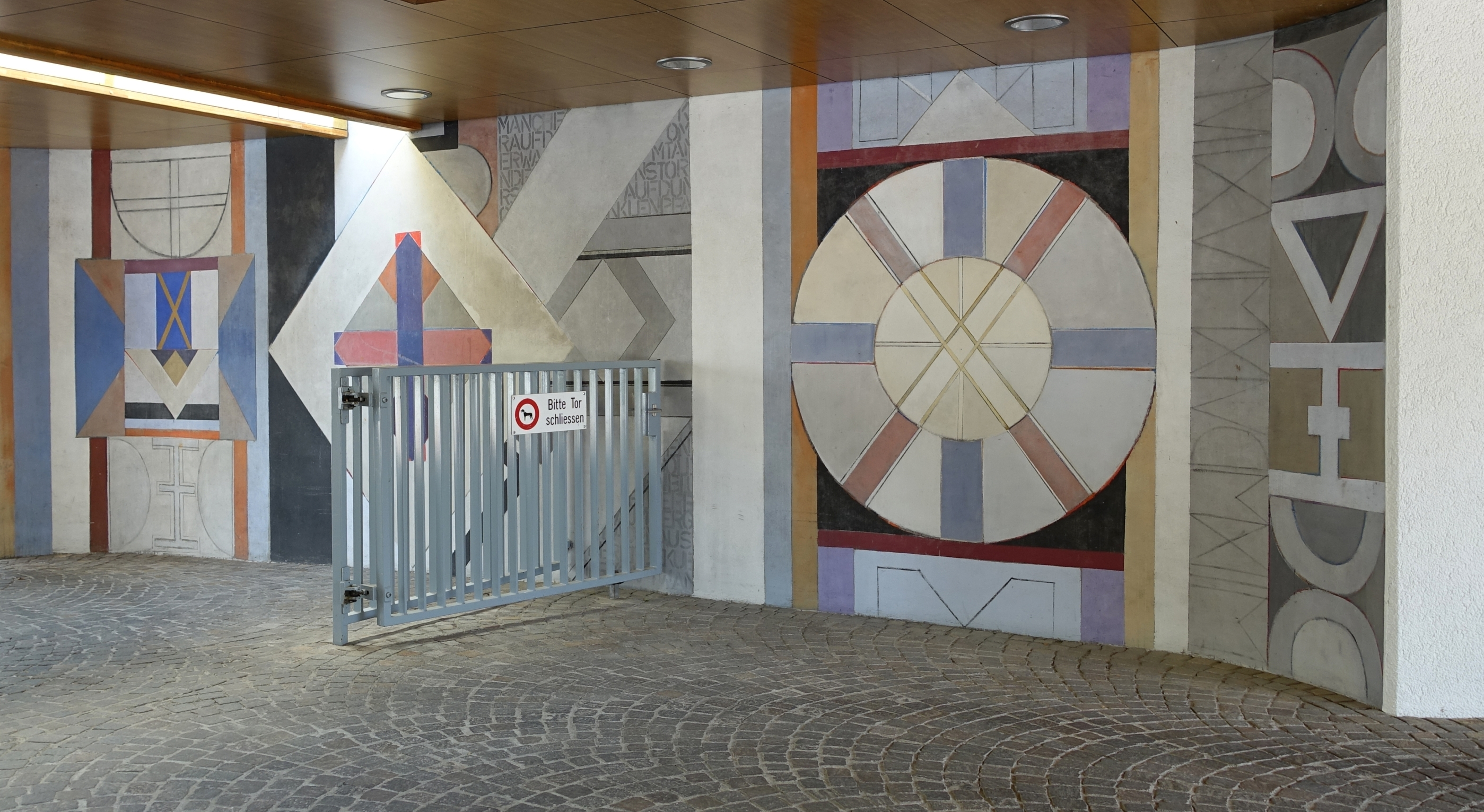 Kunst am Bau, Friedhofsanlage Fiechten, Reinach. Von Cristina Spoerri-Sprenger (1929–2013)